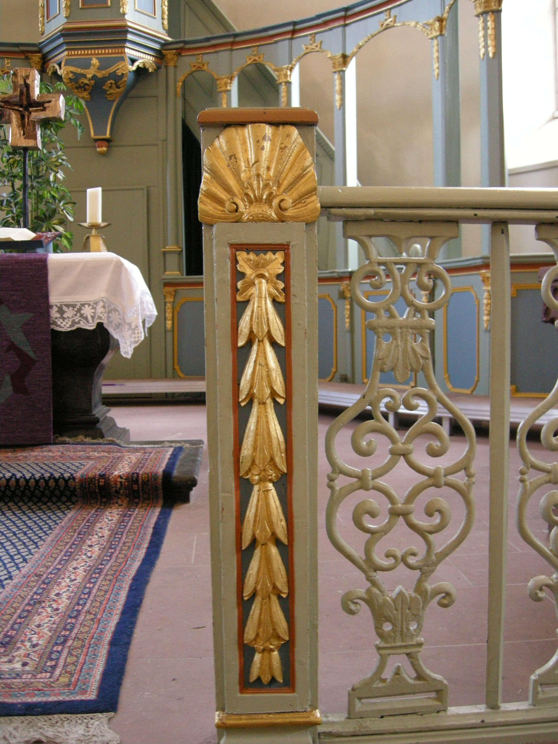 Die Ev. Kirche in Taunusstein-Wehen, erbaut 1810-1812 nach Plänen von Baurat Carl Florian Goetz. Detailaufnahme des Chorraumes